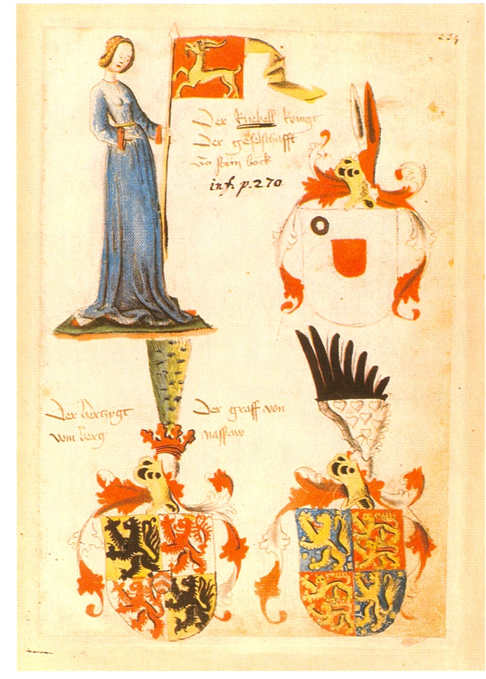 Ingeram-Codex der ehemaligen Bibliothek Cotta Jungfrau mit Banner der Gesellschaft im Steinbock) Der Knebell kenigt/Der Geselschafft/vo(m) stein böck [inf. p. 270.] Der herzygt/vom berg Der graff von/nasßaw